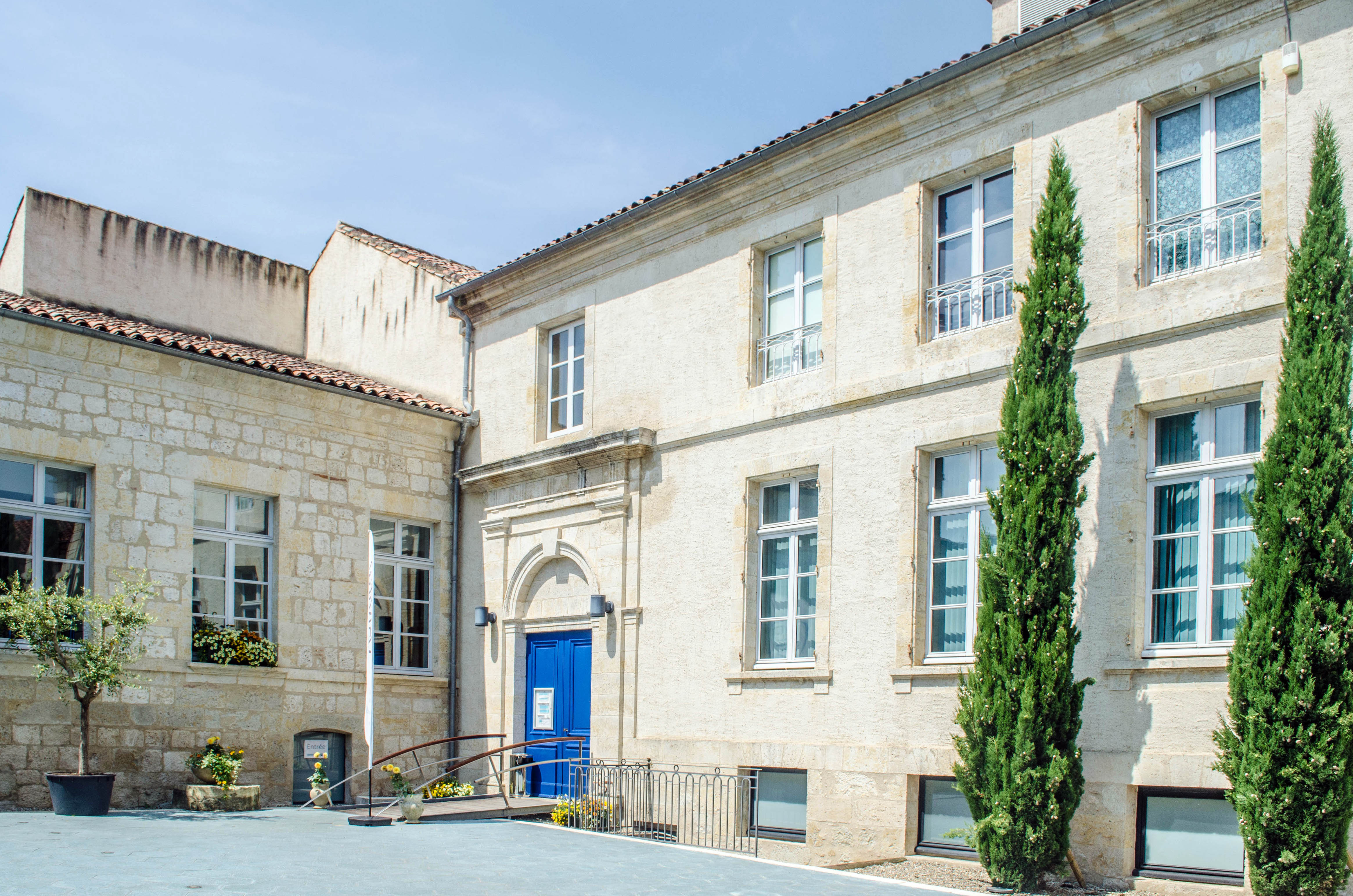 Lectoure (Gers, France), hôtel Goulard (thermes de Lectoure), cour intérieure.